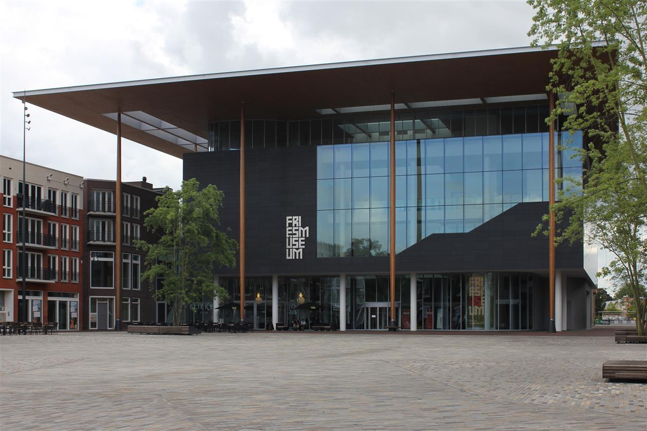 Fries Museum aan het Wilhelminaplein (Zaailand) in Leeuwarden